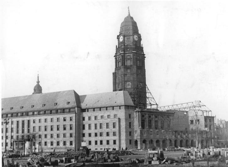 Dresden, "Neues Rathaus" im Bau Illus Elbebild 6.3.51 Dresden im Wiederaufbau. Die durch Anglo-amerikanische Bomben schwer zerstörte Innenstadt Dresdens wird künftig ein neues Gesicht erhalten. Große Bauvorhaben wurden bereits in Angriff genommen. Bis zum 1. Mai 1951 wird Dresden eine weitere Sportanlage, die Ilgenkampfbahn, erhalten. UBz: Der Bau des "Neuen Rathauses". Aufn.: 10.2.51